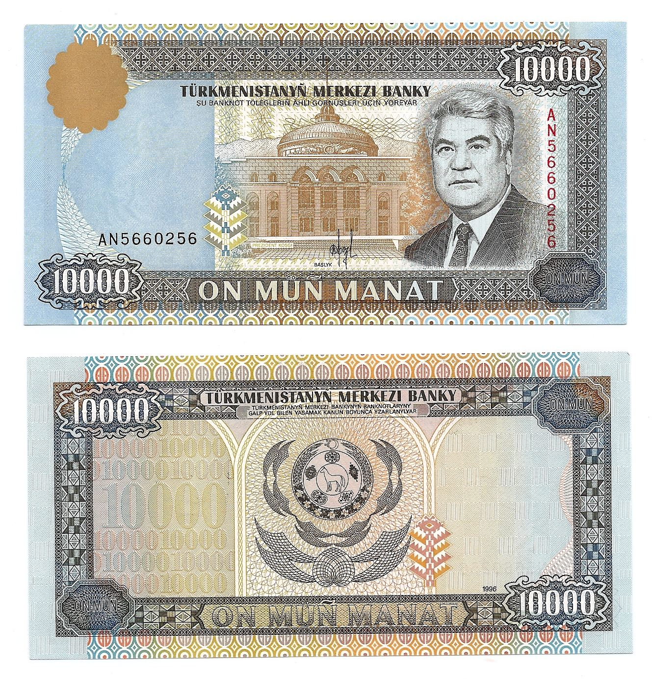 Niyazov, Saparmurat, President, 1940 Gypjak, near Ashgabat - 2006 Ashgabat, Turkmenistan Portrait of president Niazov at r., / Arms of Turkmenisten. Pick 10 Condition: A perfect UNCICULATED bank note.